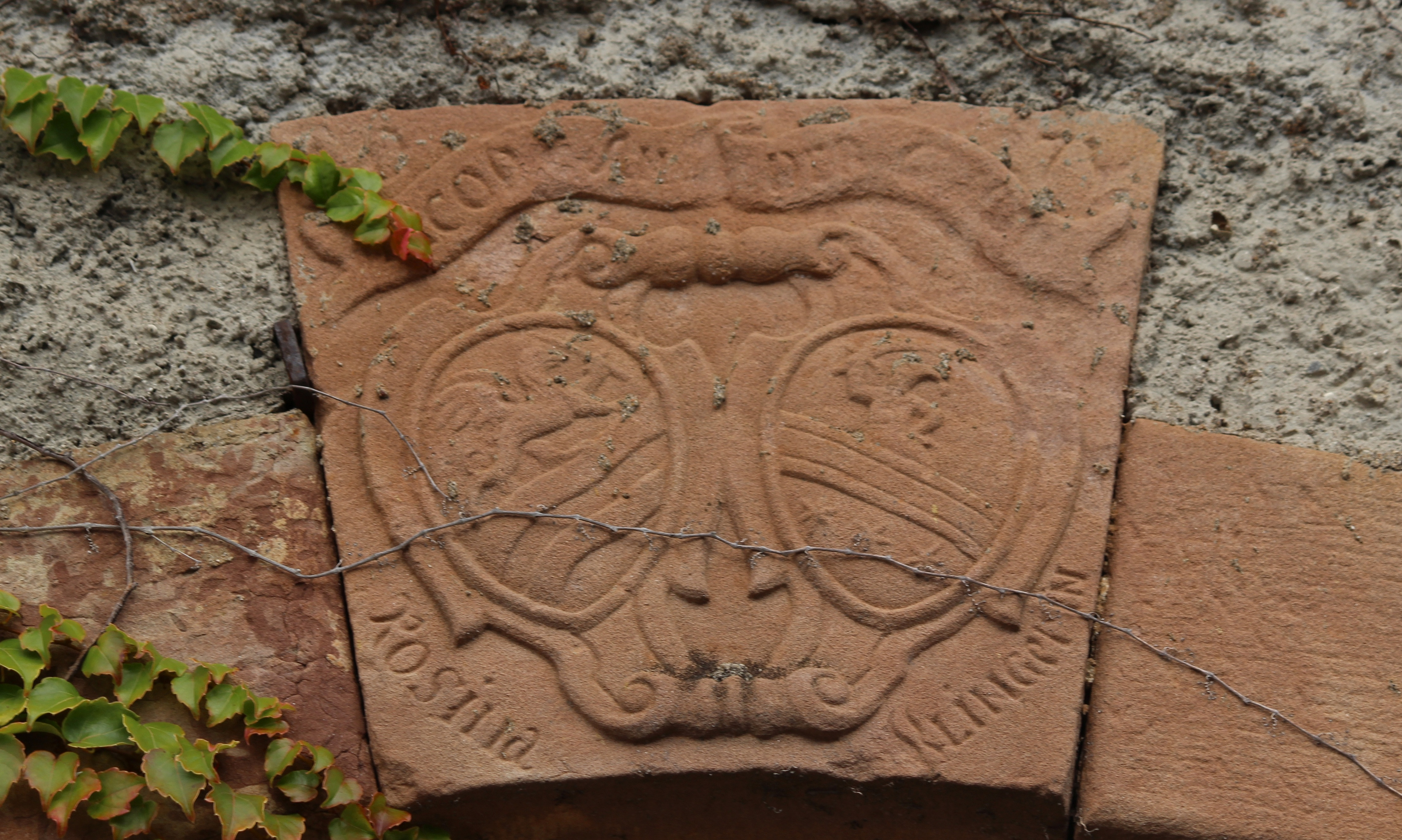 Wappen am Ansitz Andergassen in Oberplanitzing in Kaltern